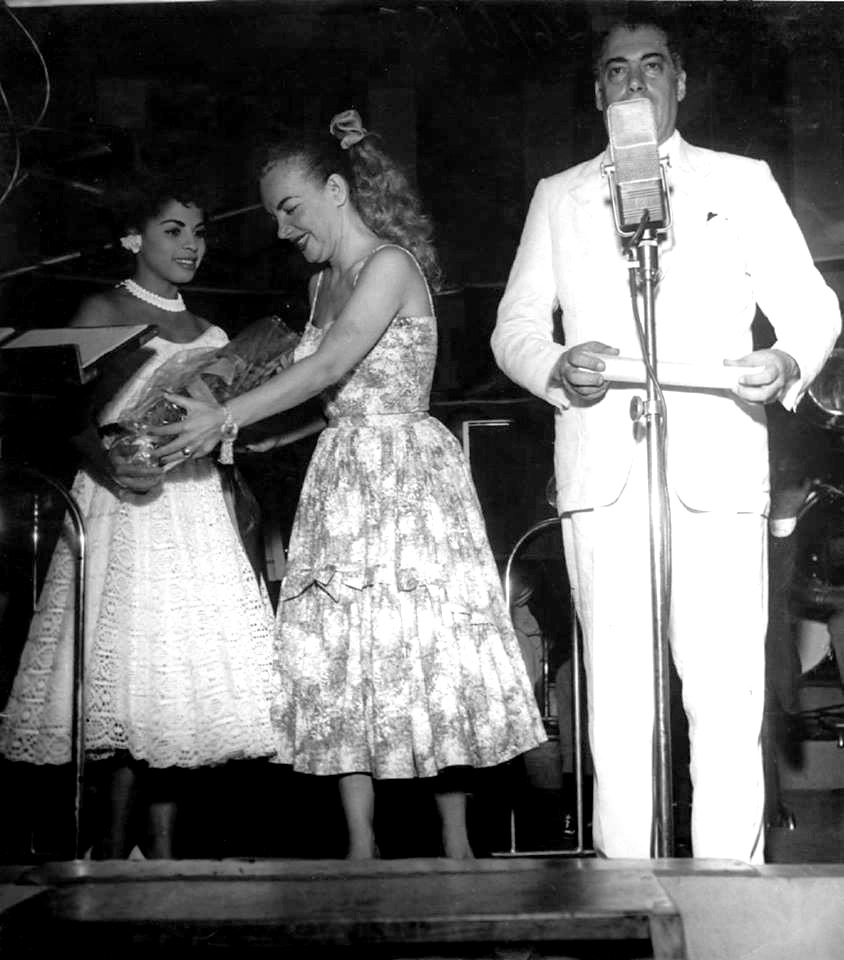 Ângela Maria, Carmen Miranda e Almirante, na Rádio Mayrink Veiga em fevereiro de 1955.